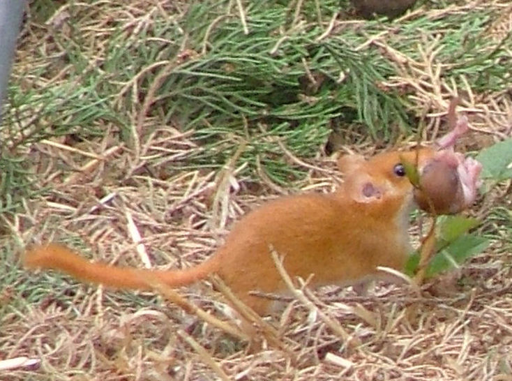 Muscardinus avellanarius, Moscardino, San Giorgio del Sannio , Località I Marzani (Benevento), Italia